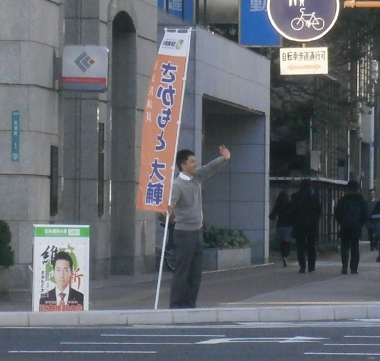 日本維新の会所属の坂元大輔衆議院議員の街頭演説の様子。2013年1１月に広島県福山市の福山郵便局前交差点、中国銀行福山支店前で自身の旗を持っている様子を撮影